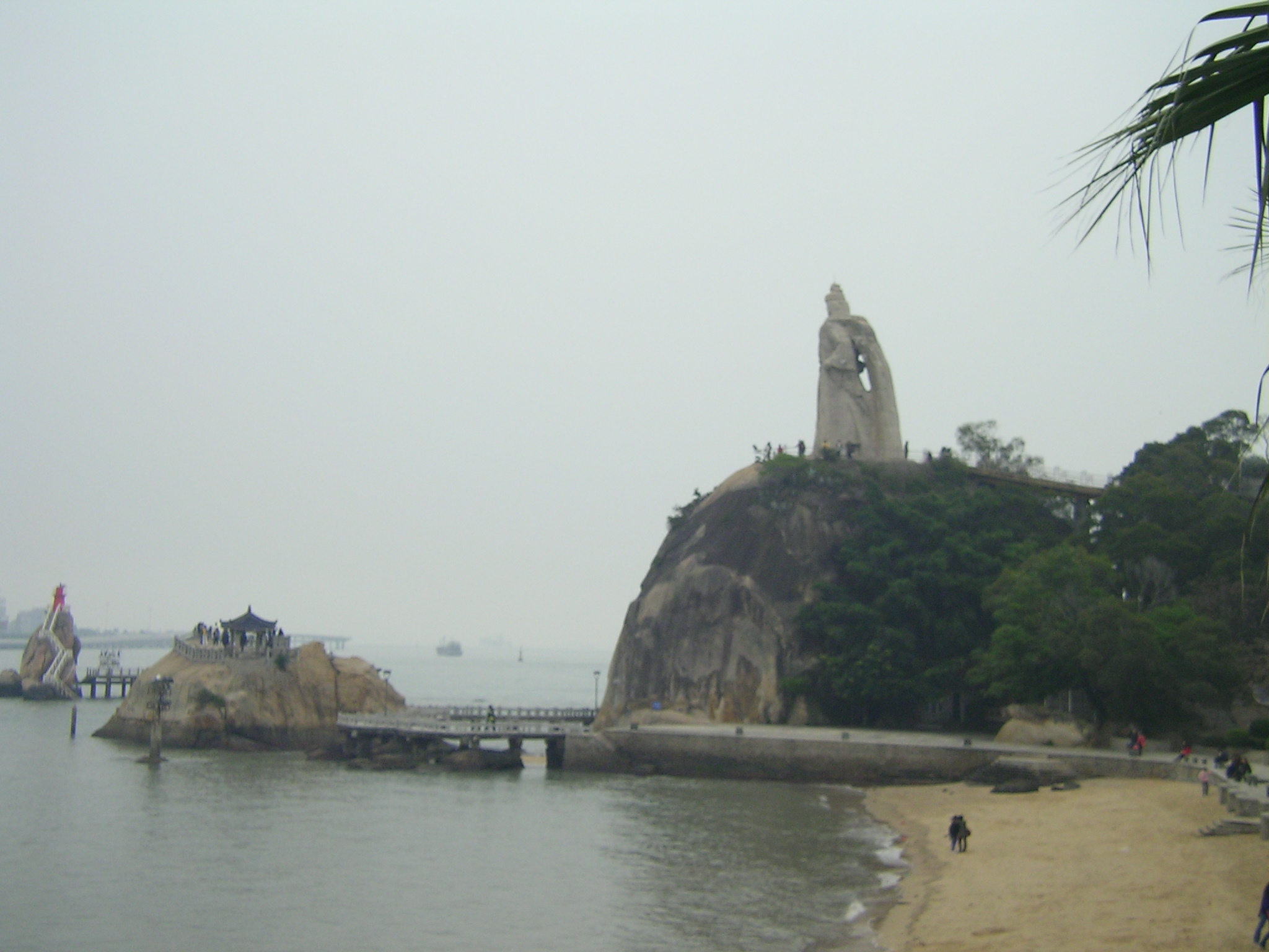 厦门 鼓浪屿 郑成功塑像